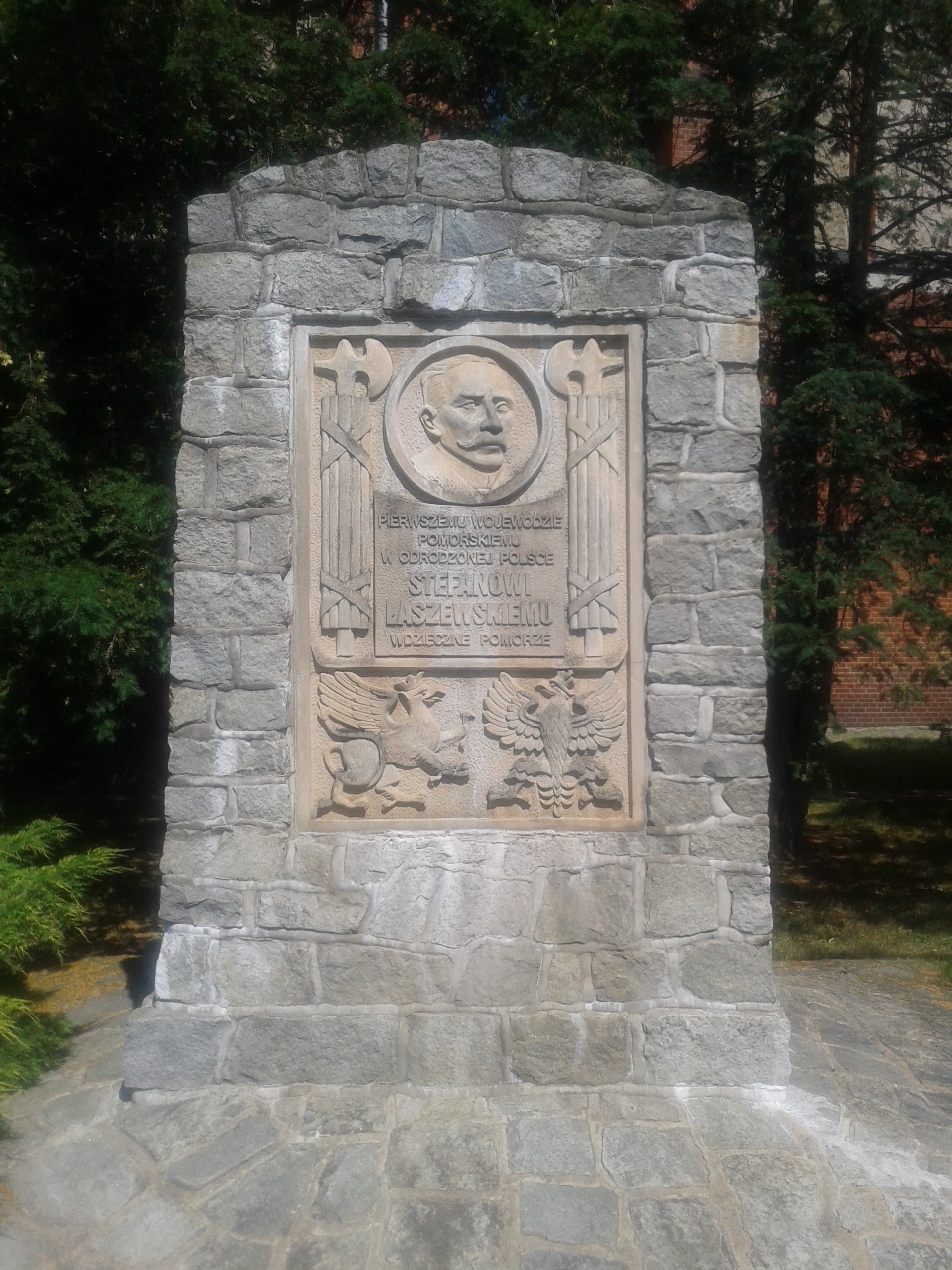 Pomnik Stefana Łaszewskiego w Toruniu, napis na pomniku: Pierwszemu wojewodzie pomorskiemu w odrodzonej Polsce - Stefanowi Łaszewskiemu - wdzięczne Pomorze